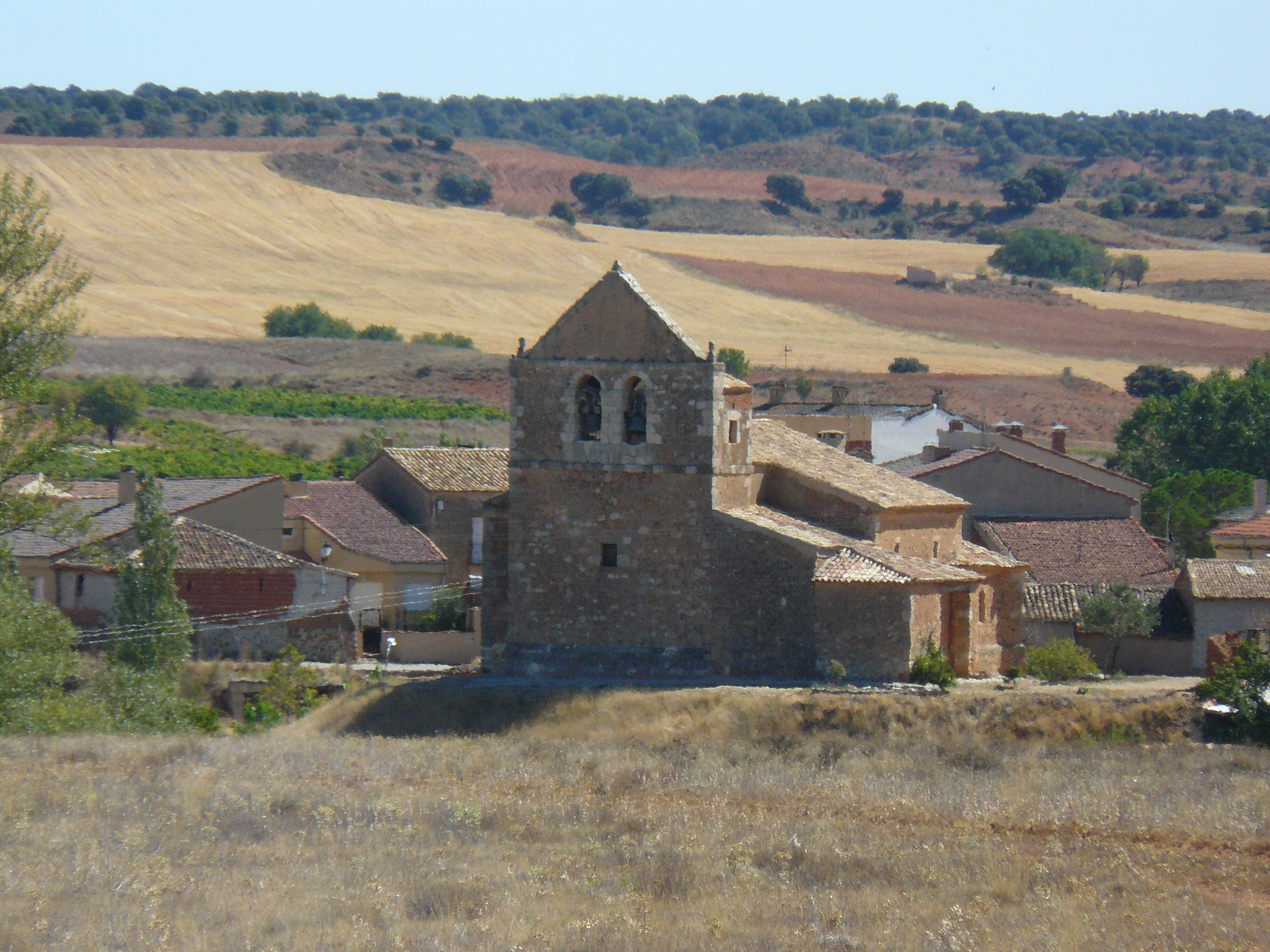 Iglesia de San Juan Buatista, Matanza de Soria (Soria).. - Google Maps - Google Earth